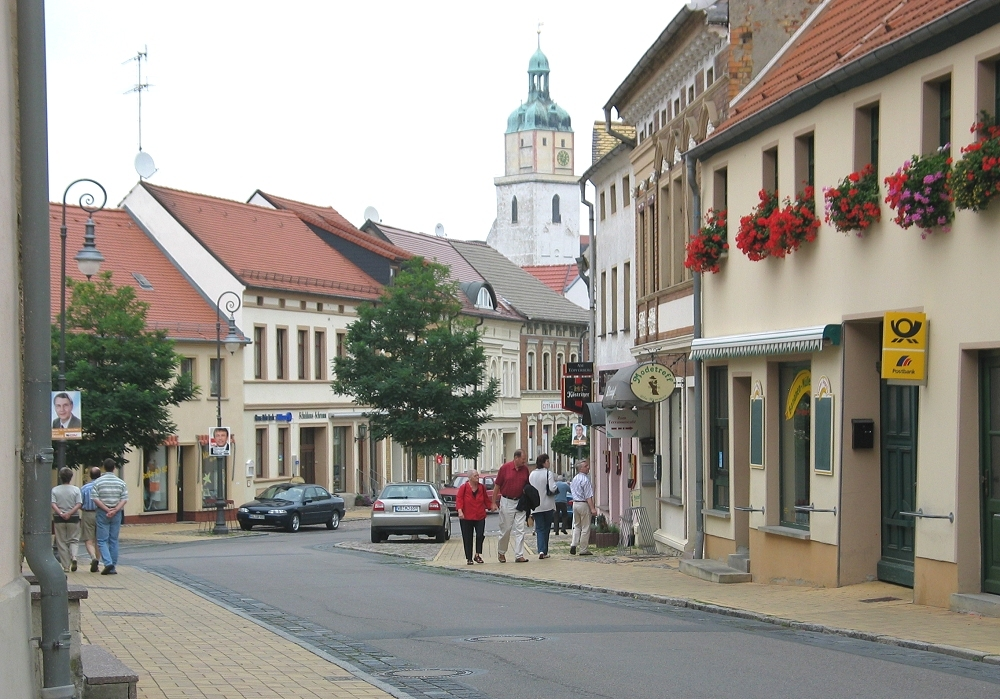 Innenstadt von Bad Schmiedeberg Sonstiges: ...